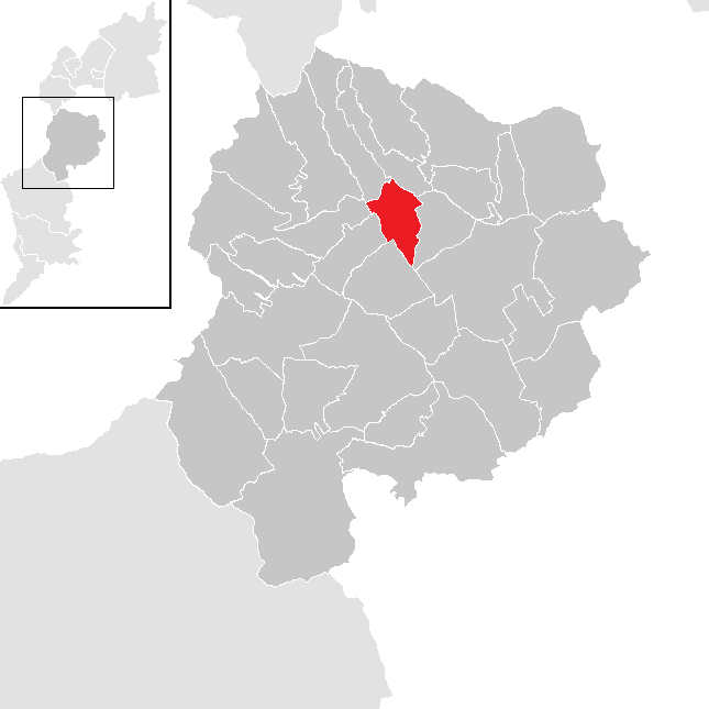 Bezirk Oberpullendorf